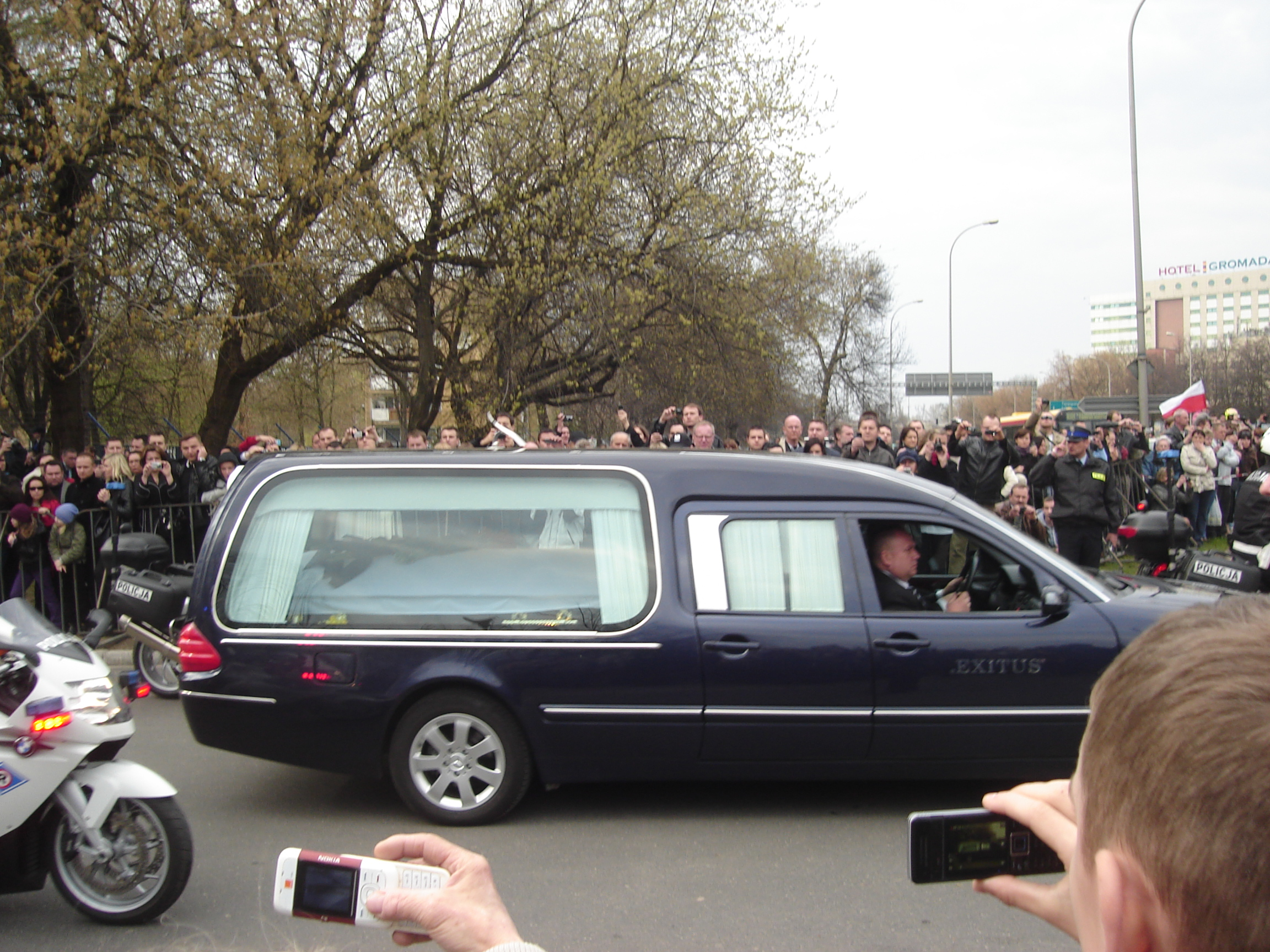 Kondukt z trumną prezydenta Lecha Kaczyńskiego